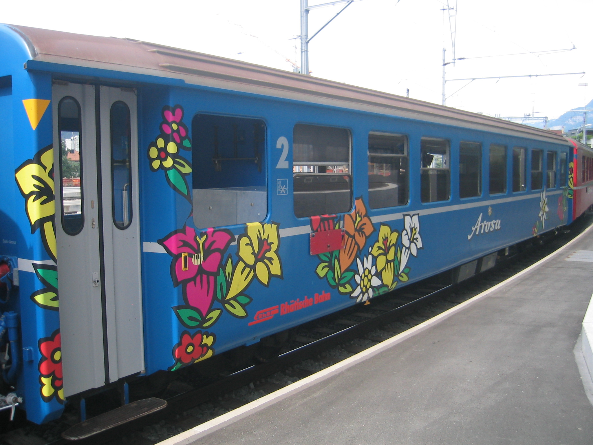 blauer RhB Wagen der Arosa Linie